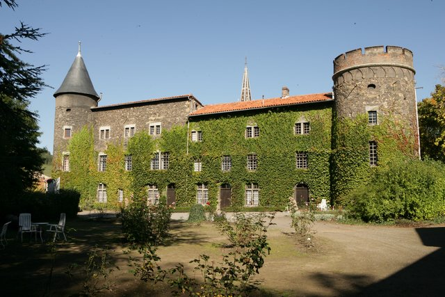 Photo du château du Marquis de Fenoyl. Ce château se trouve à Sainte Foy l'Argentière.